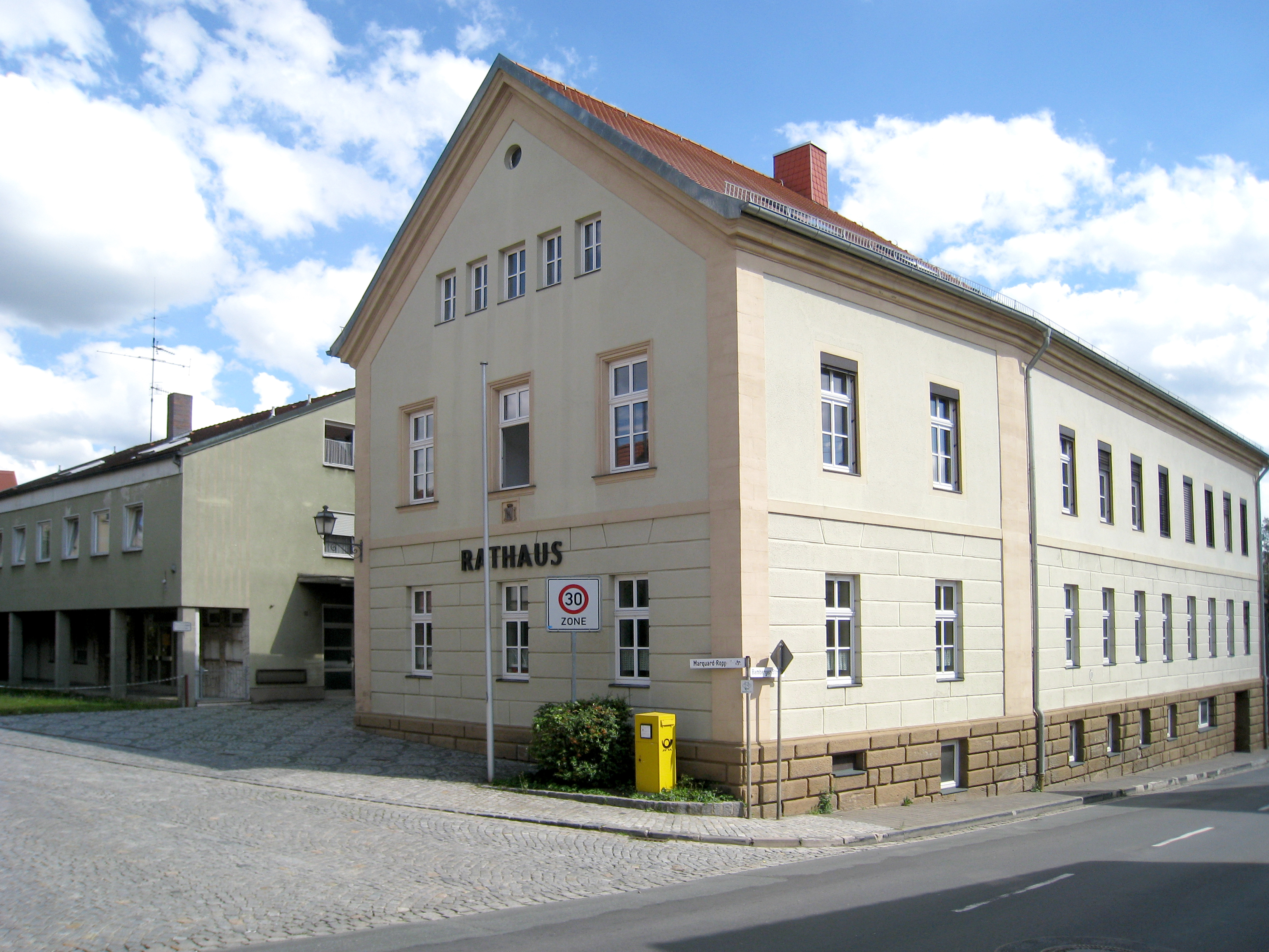 Das Rathaus von Baunach. Vorher als Schule genutzt.